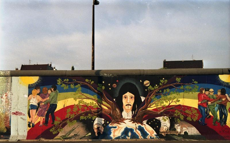 25.7.1991 "East-Side-Gallery", gelegen zwischen der Jannowitzbrücke und der Oberbaumbrücke. Reste der Berliner Mauer, die nach der Öffnung von vorwiegend ostdeutschen Künstlern auf der Ost-Seite bemalt wurden.